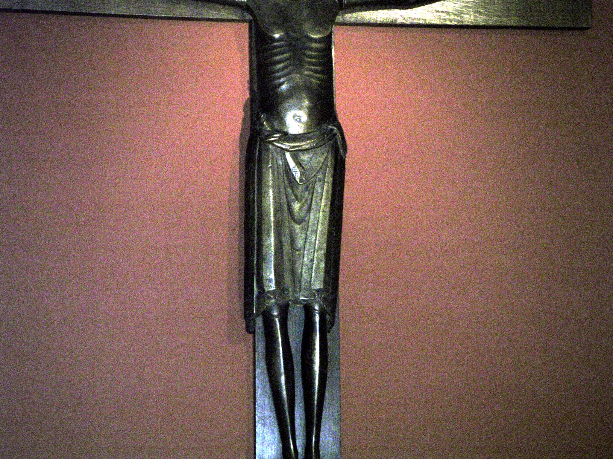 Lendenschurz des Helmstedter Kreuzes, Schatzkammer der Abteikirche Werden